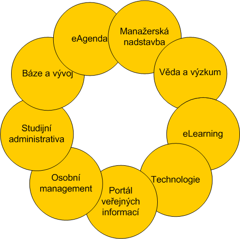 Struktura Univerzitního informačního systému MZLU v Brně